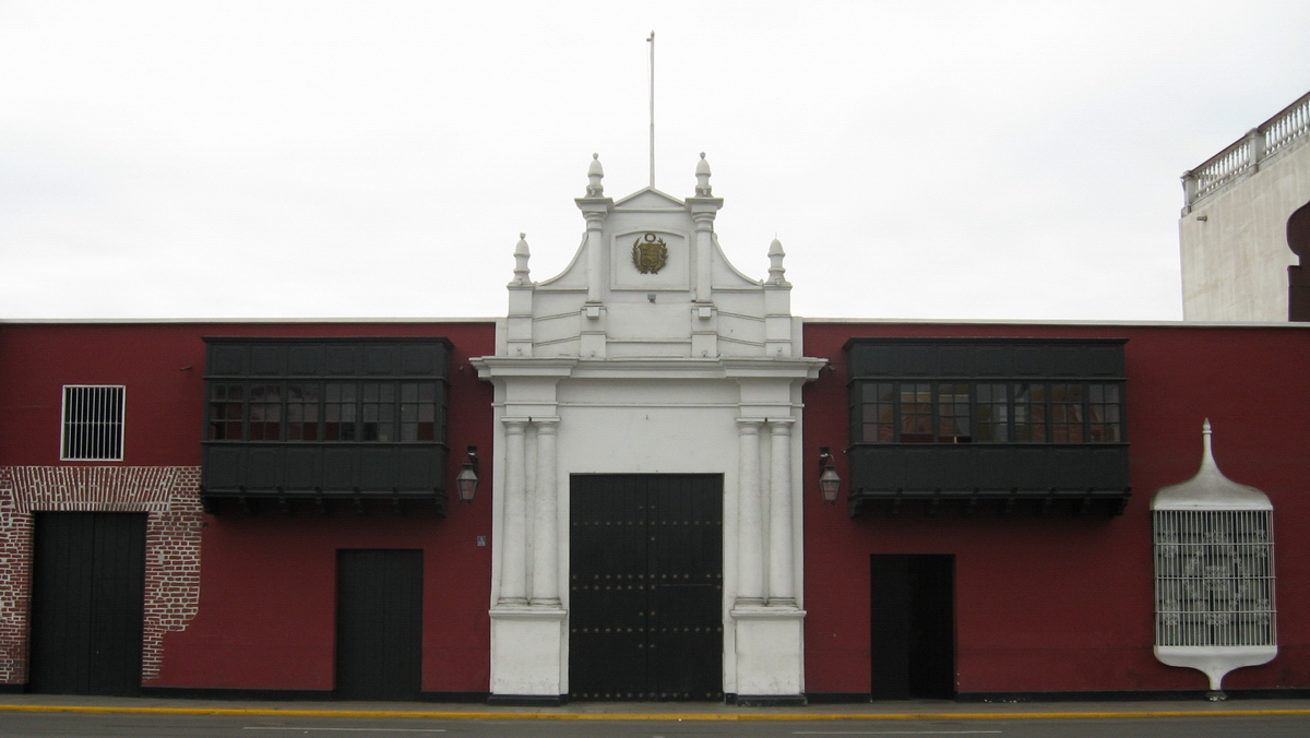 Casa "Muñoz y Cañete", actual sede de la prefectura de la ciudad de Trujillo (Perú); ocupa el solar asignado a Francisco Pizarro durante la fundación de la ciudad en 1535.